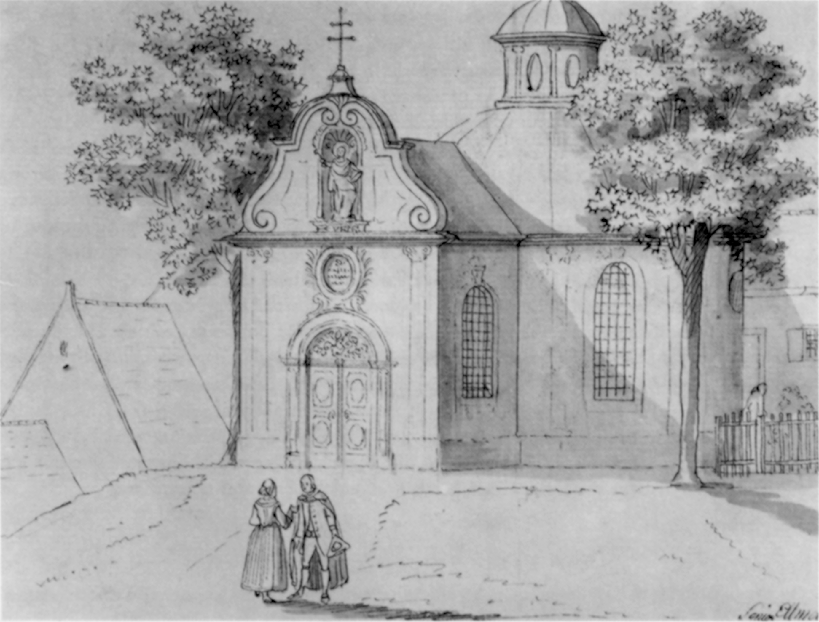 Die Peterskapelle in Freising